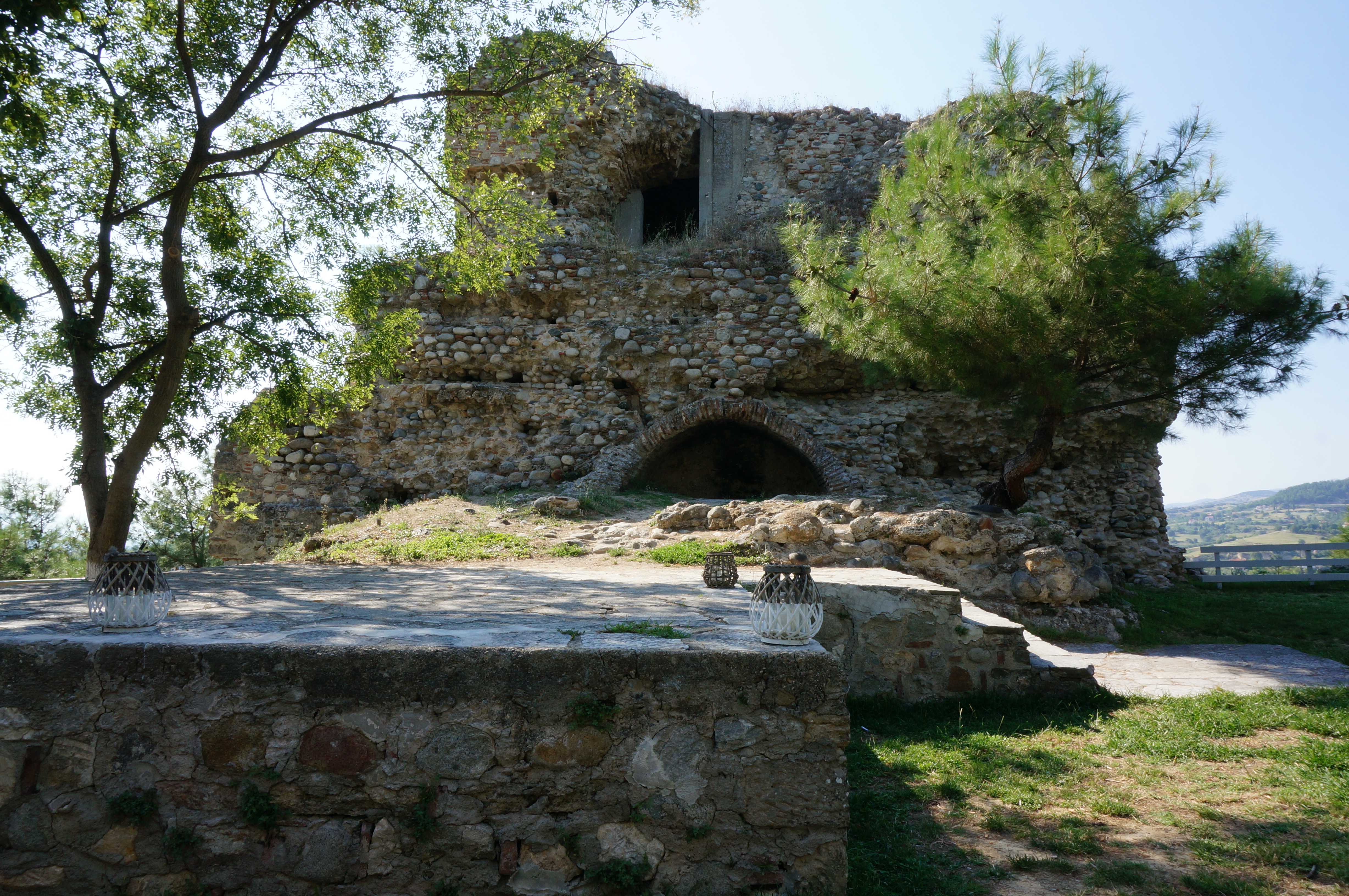 à Serres.